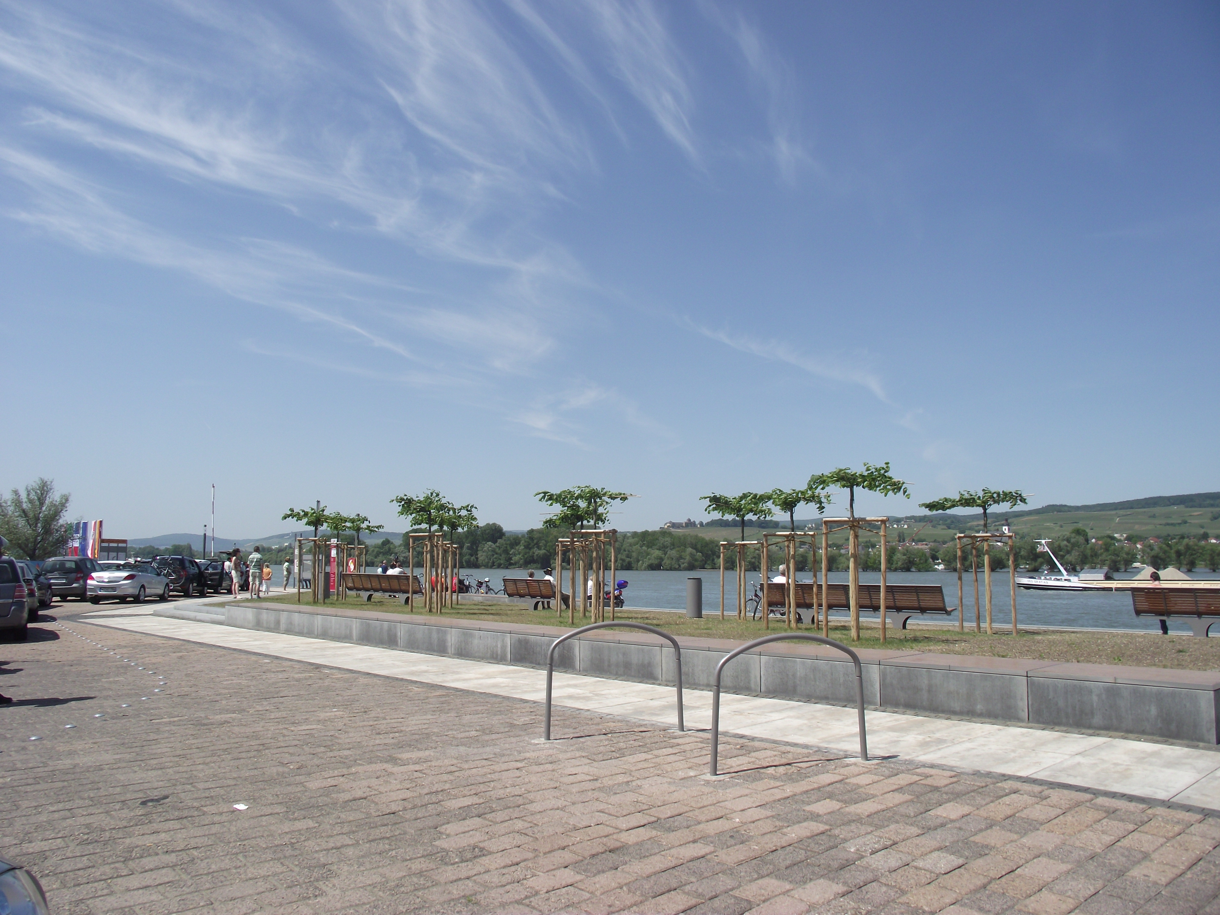 Mole in Frei-Weinheim mit Blick auf Winkel und Johannisberg im Rheingau